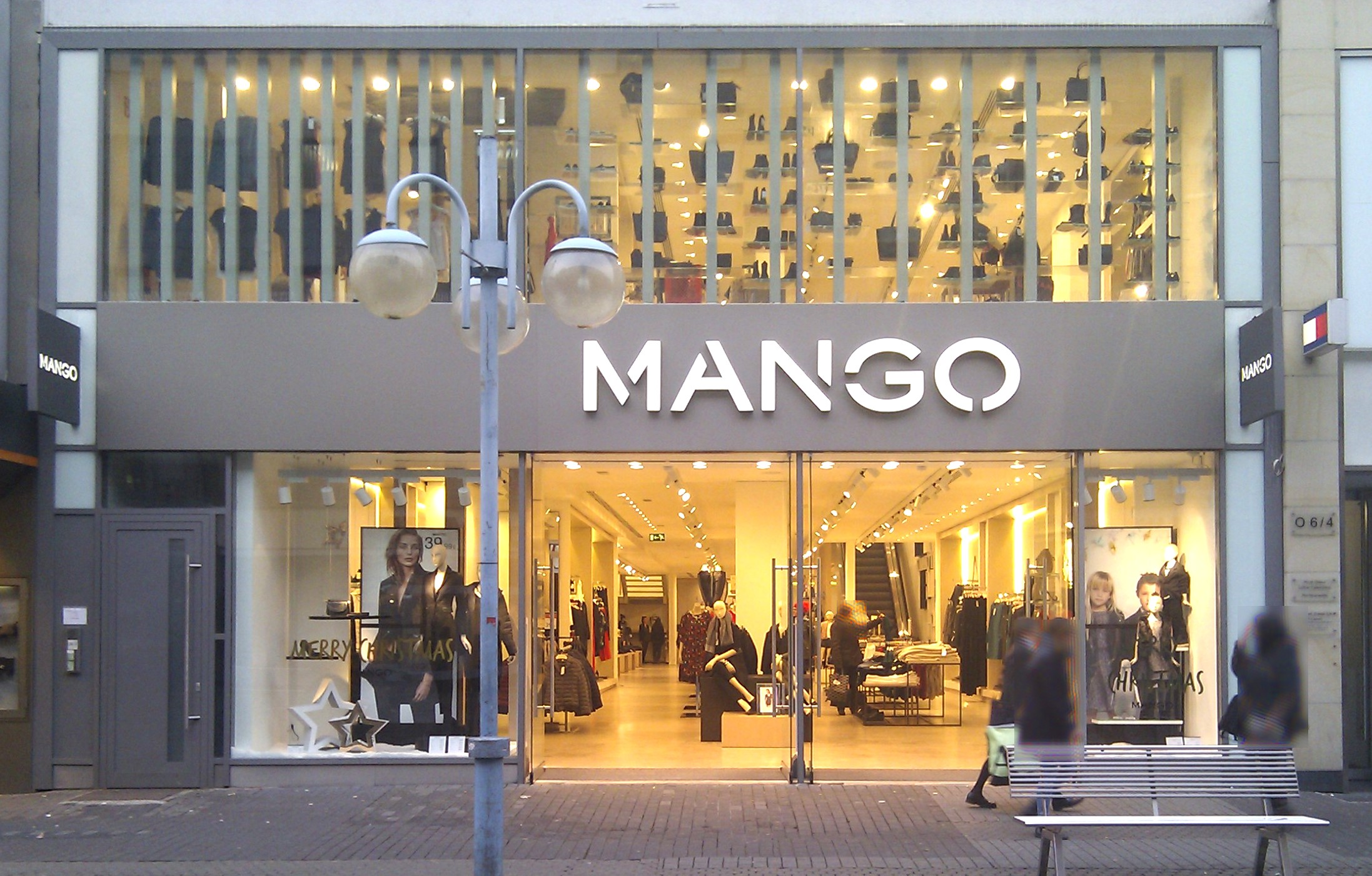 Geschäfte in Mannheim O6